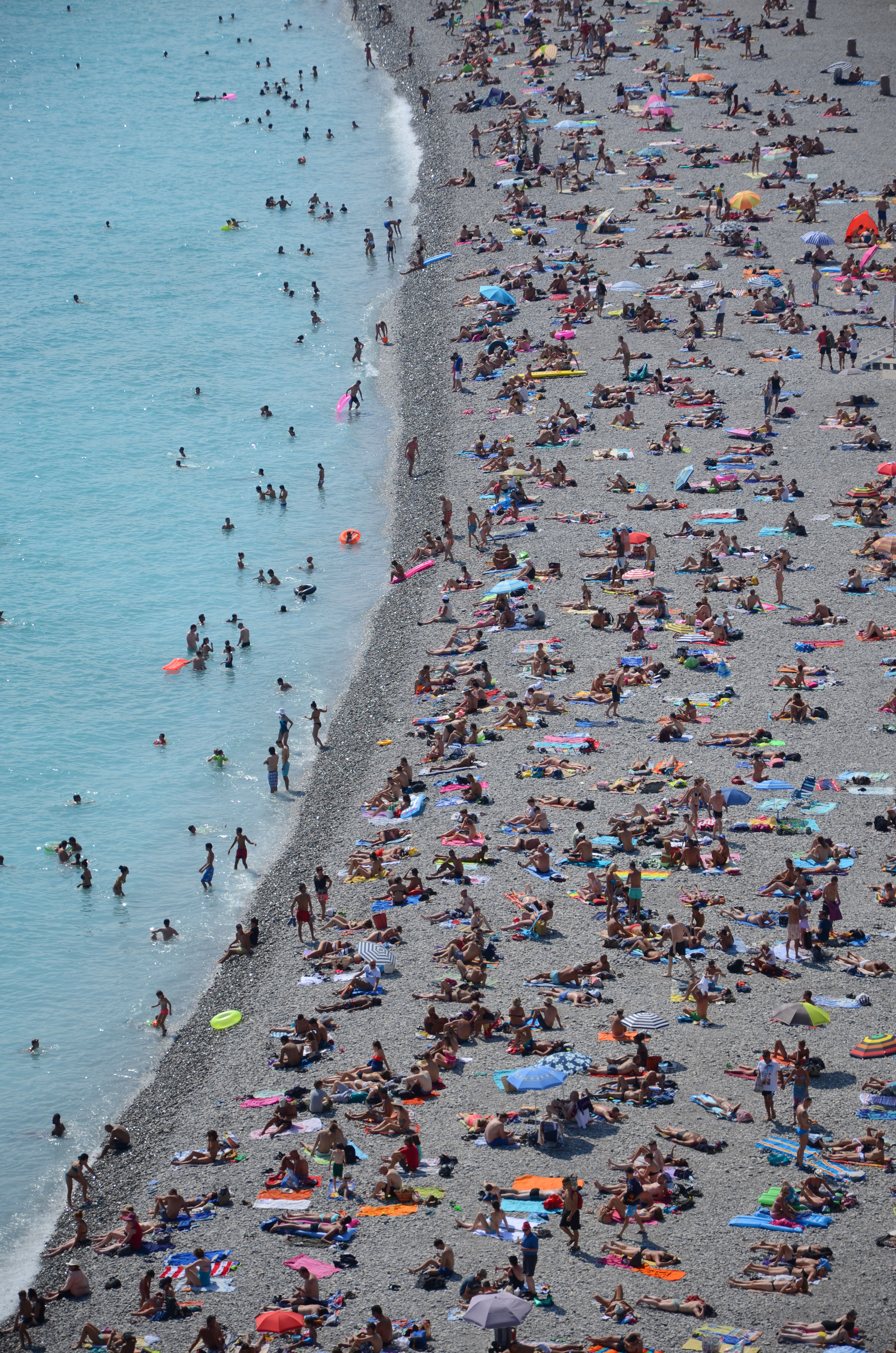 De drukke stranden van de Cote d'Azur in Nice.